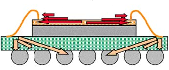 Монтаж кристалла по технологии wire bonding